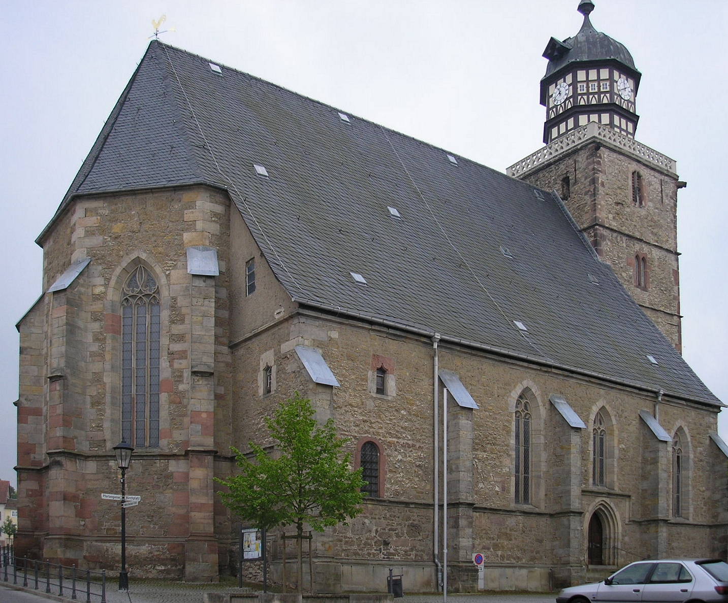 Stadtkirche von Geisa (Rhön).